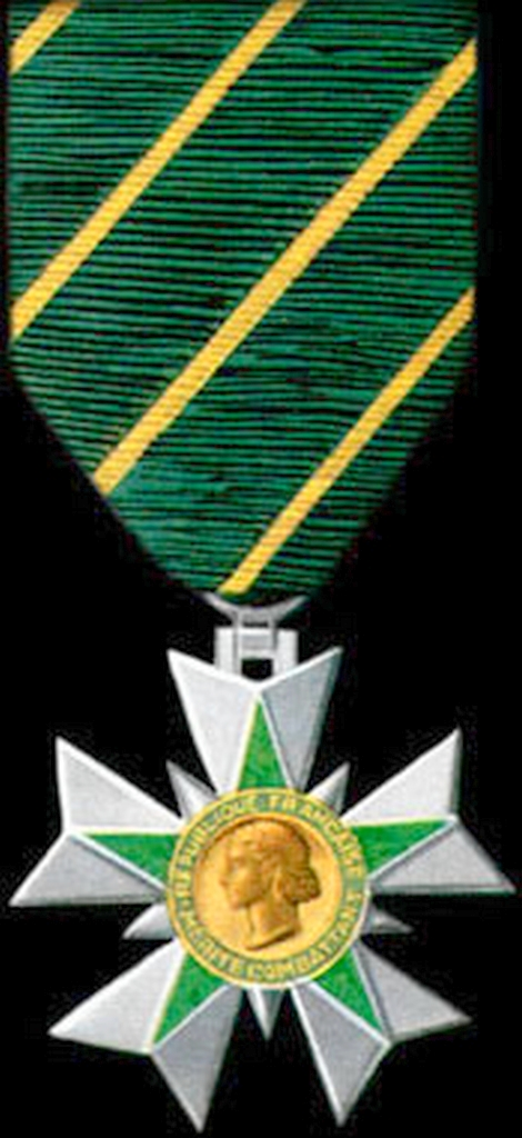 Croix de Chevalier de l'ordre du mérite combattant.